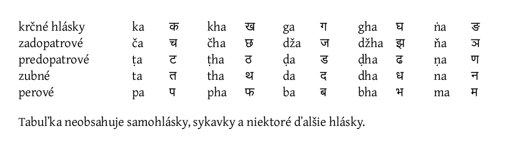 Tabuľka sanskrtských hlások.